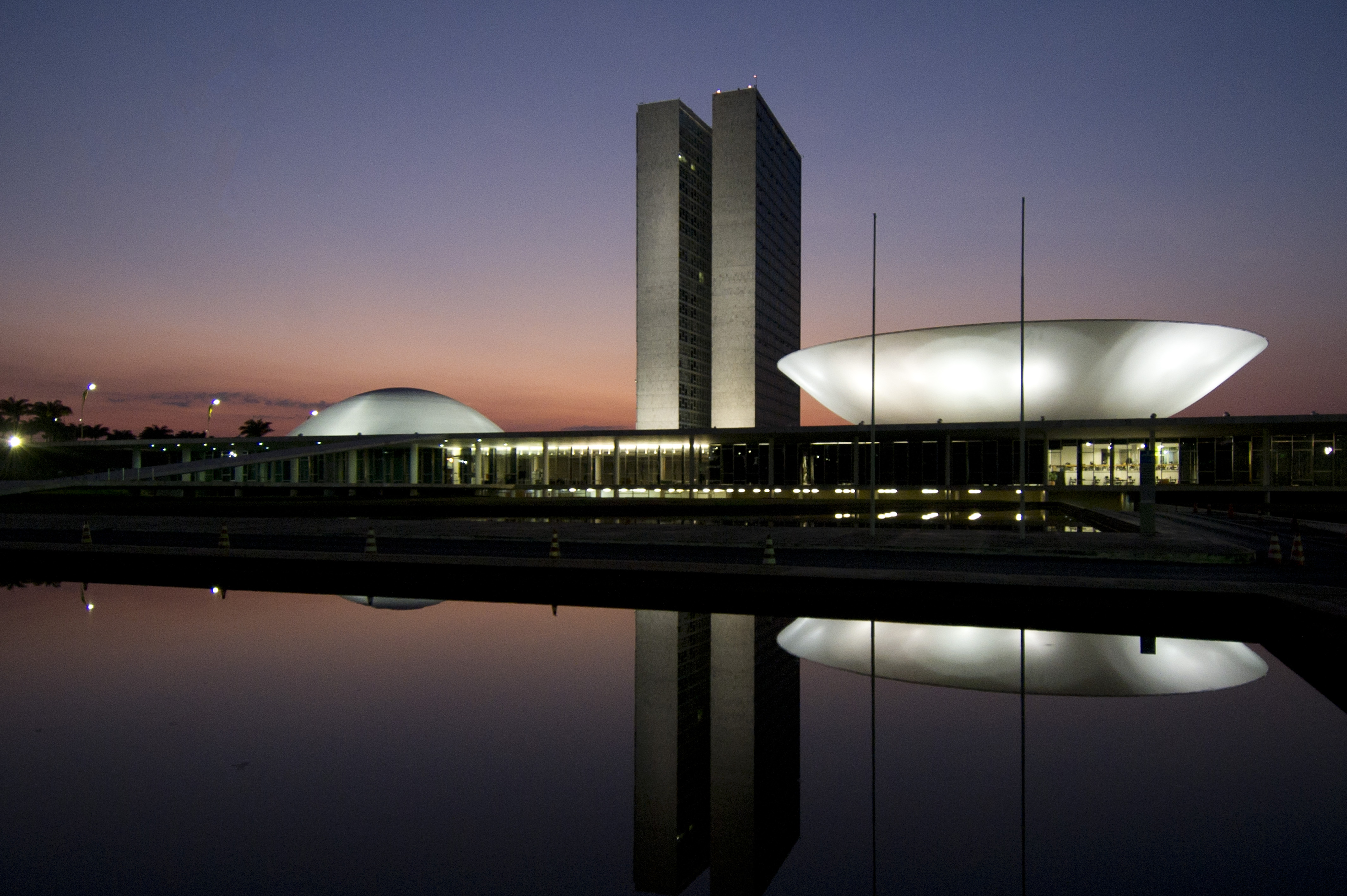 BIE - Banco de imagens externas - Amanhecer no Congresso Nacional. O Congresso Nacional é o órgão constitucional que exerce, no âmbito federal, as funções do Poder Legislativo, quais sejam, elaborar/aprovar leis e fiscalizar o Estado Brasileiro (suas duas funções típicas), bem como administrar e julgar (funções atípicas). O Congresso Nacional é bicameral, sendo composto por duas Casas: o Senado Federal, integrado por 81 senadores, que representam as 27 unidades federativas (26 estados e o Distrito Federal), e a Câmara dos Deputados, integrada por 513 deputados federais, que representam o povo. Foto: Pedro França/Agência Senado